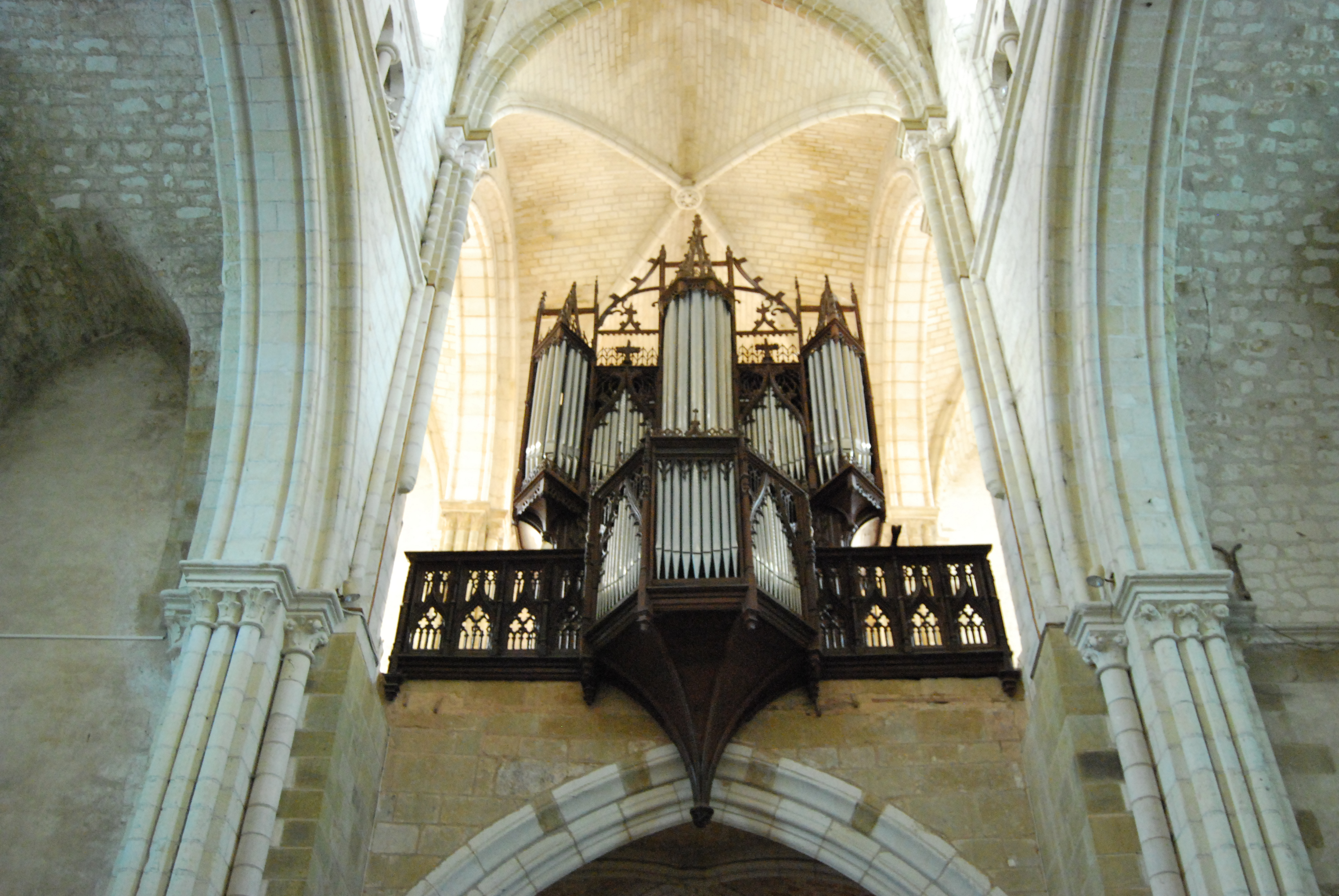 Vue des grandes orgues de Saint-Sylvain de Levroux, comptant parmi les plus anciennes de France: buffet de 1502 par Guillaume Certin pour l'instrument lui disparu de Guillaume Saffrey; contient un orgue de 1977 par Jean-Paul EDOUARD et Bertrand Cattiaux, harmonisé par Jean-Loup Boisseau.